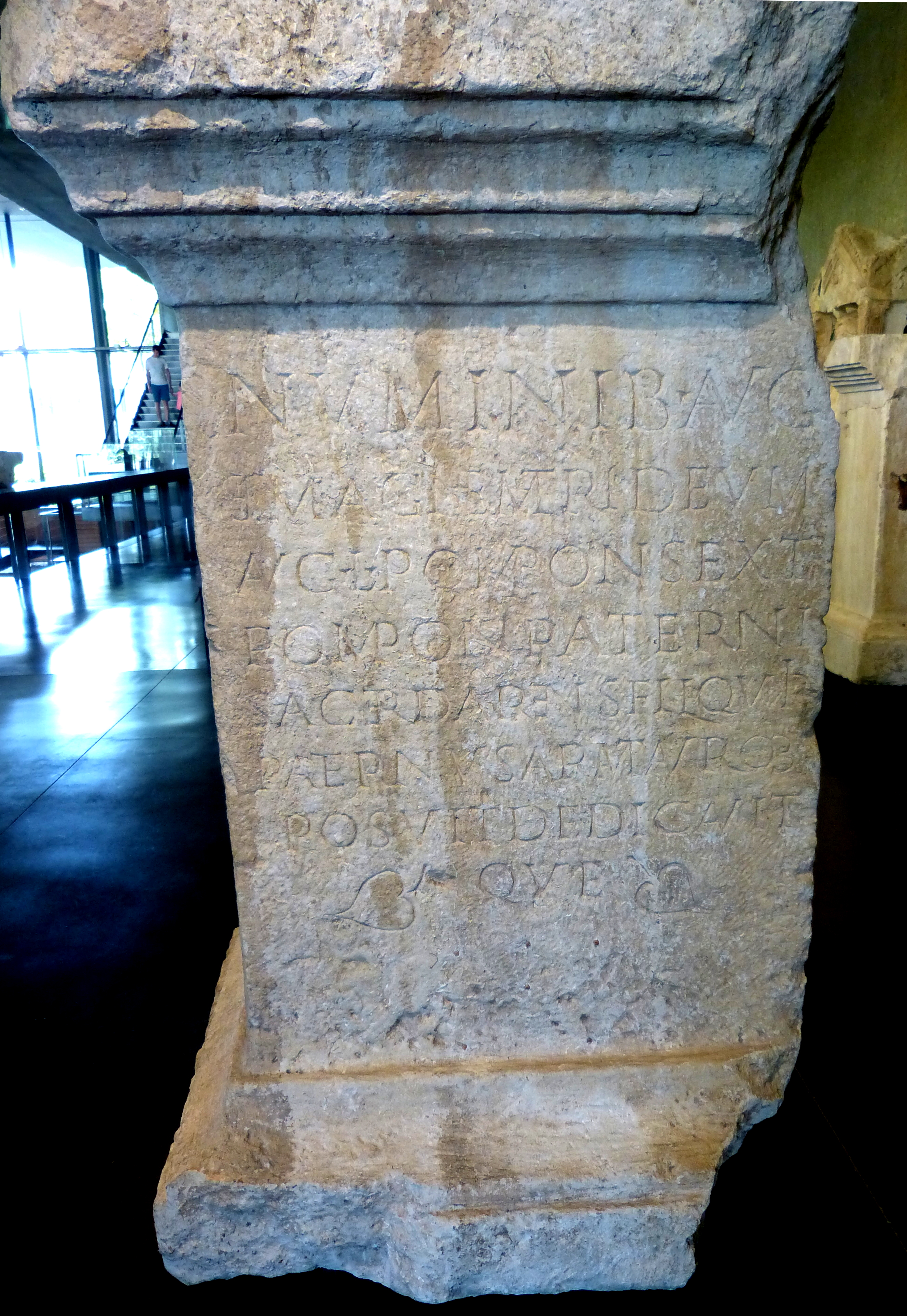 Périgueux ( Dordogne ). Vesunna-Museum: Widmungsinschrift des Lucius Pomponius Paternus, aus der Tribus Quirina, Sohn des Lucius Pomponius Sextus, Priester am Altar in Lyon, für einen Tauribolium-Altar der Kybele und der Numina der Kaiser ( 3.Jhdt.n.Chr.): NUMINIB AUG ET MAGNE MATRI DEUM AUG L POMPON SEXT POMPON PATERNI SACERD ARENS FIL QUIR PATERNUS ARAM TAUROB POSUIT DEDICAVITQUE.